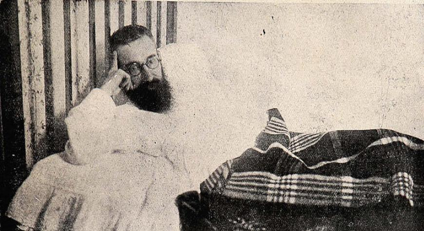 "El literato español D. Ramón del Valle-Inclan en pose para «Sucesos»". Reportaje de Revista chilena "Sucesos" del 20 de octubre de 1910 titulado "El marqués de Bradomín".